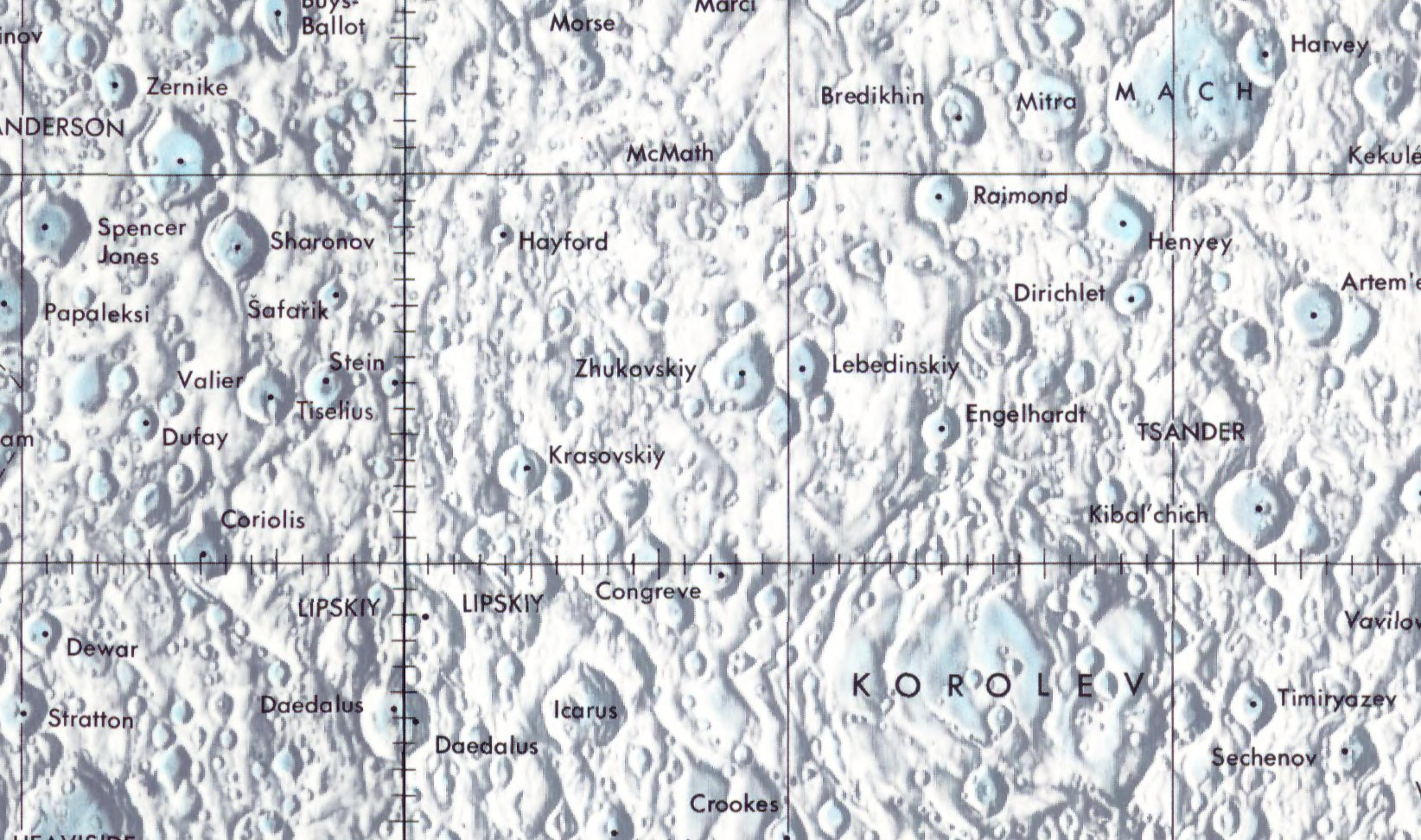 Cráter lunar Zhukovskiy. Localización. (Lunar Chart LPC1. Second Edition)